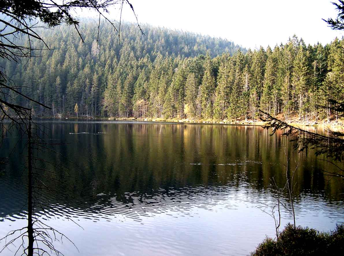 Západní břeh Čertova jezera, vlevo na foto je jezerní stěna